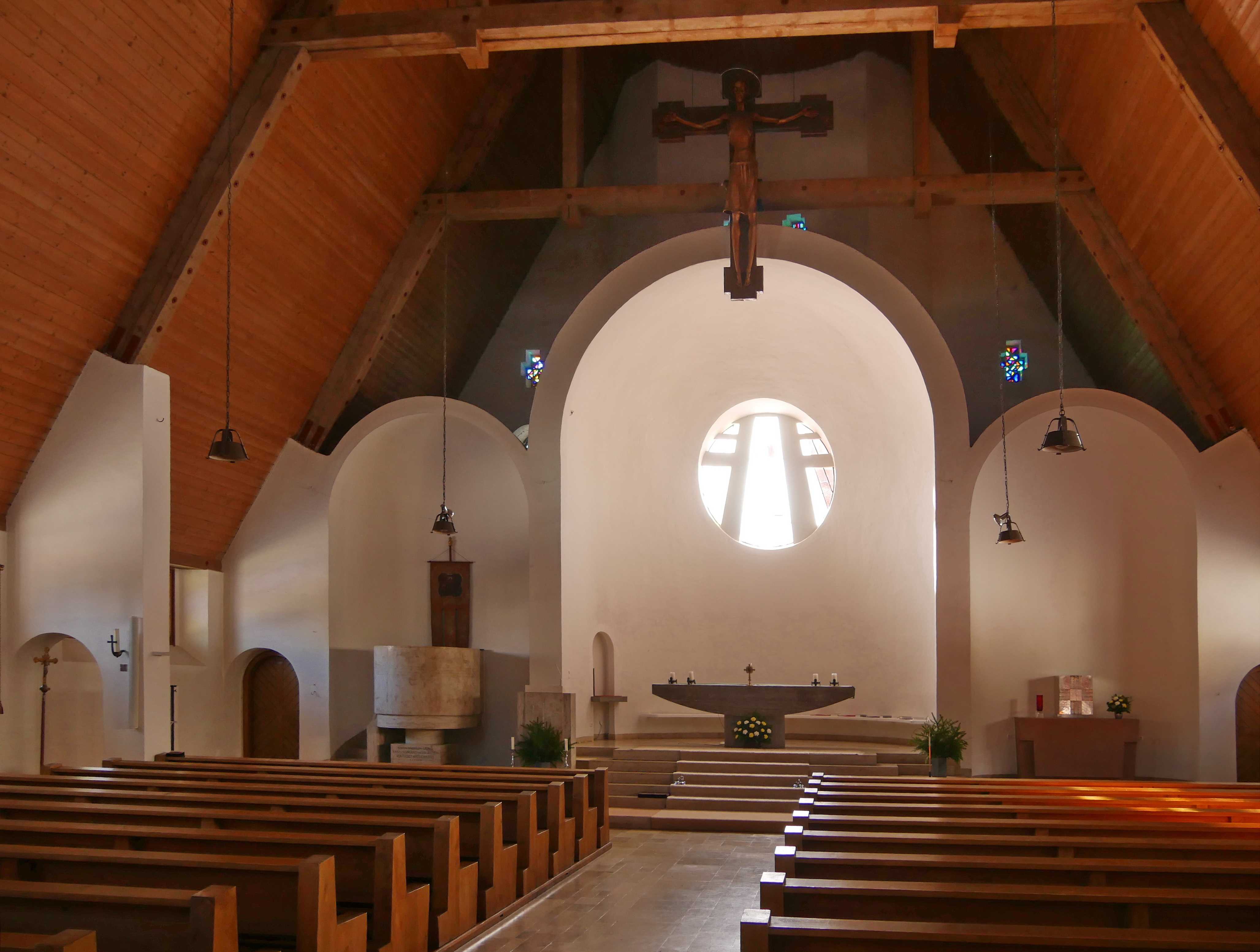 Kochel am See, Ortsteil Walchensee: Katholische Pfarrkirche Sankt Ulrich. Innenansicht, Blick zum Altar